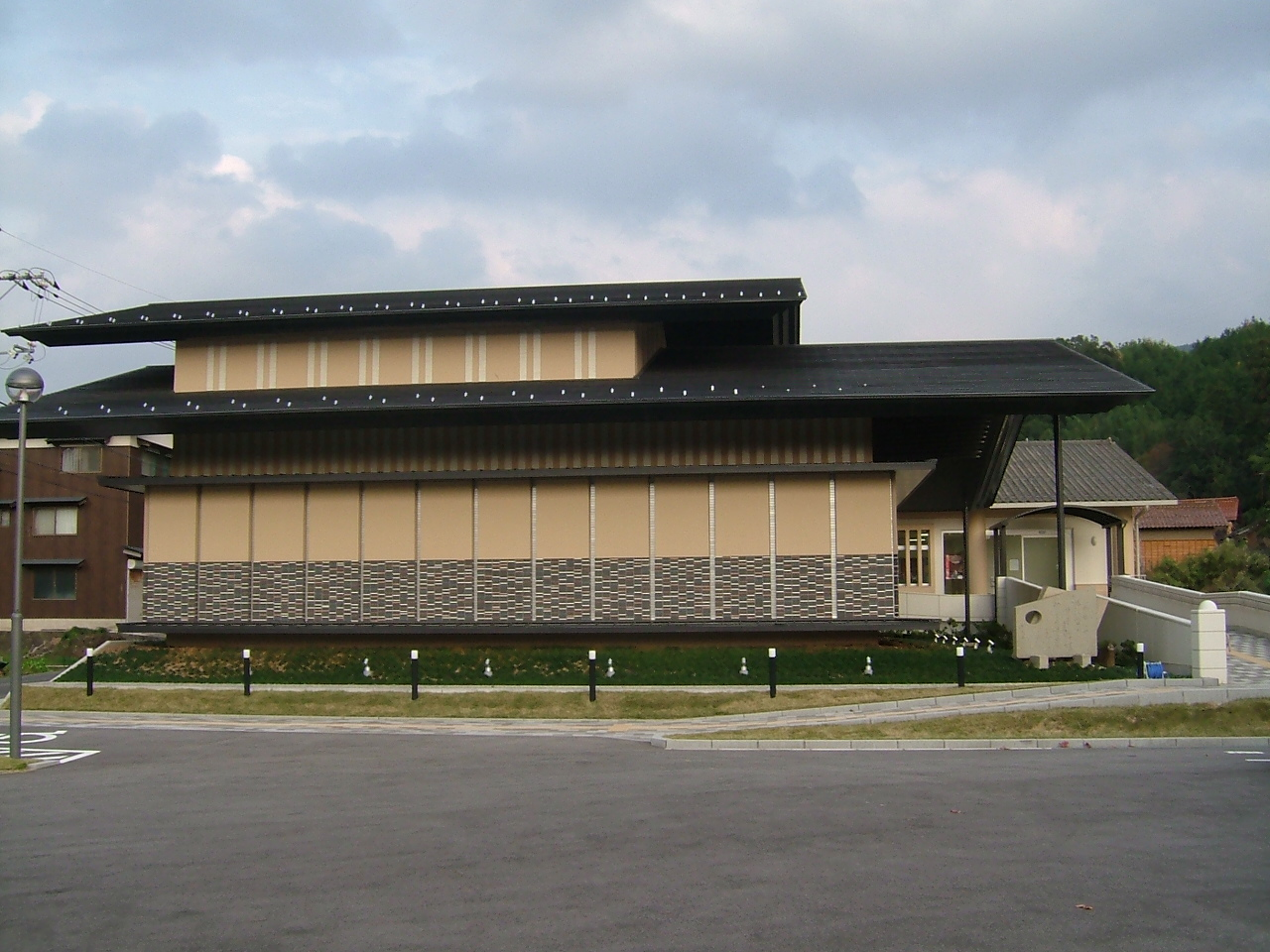 上淀白鳳の丘展示館 Kamiyodo Hakuho-no-Oka Exhibition Hall 2011年11月13日 撮影者:KASEI